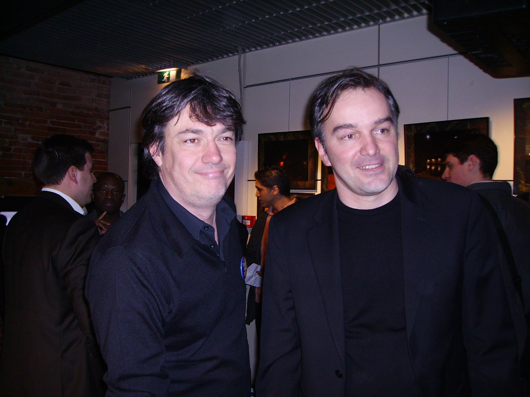 Alain Marschall et Olivier Truchot, animateurs de l'émission de radio Les Grandes Gueules sur RMC, à Toulouse lors du « Tour de Gaule » des Grandes Gueules en janvier 2007.